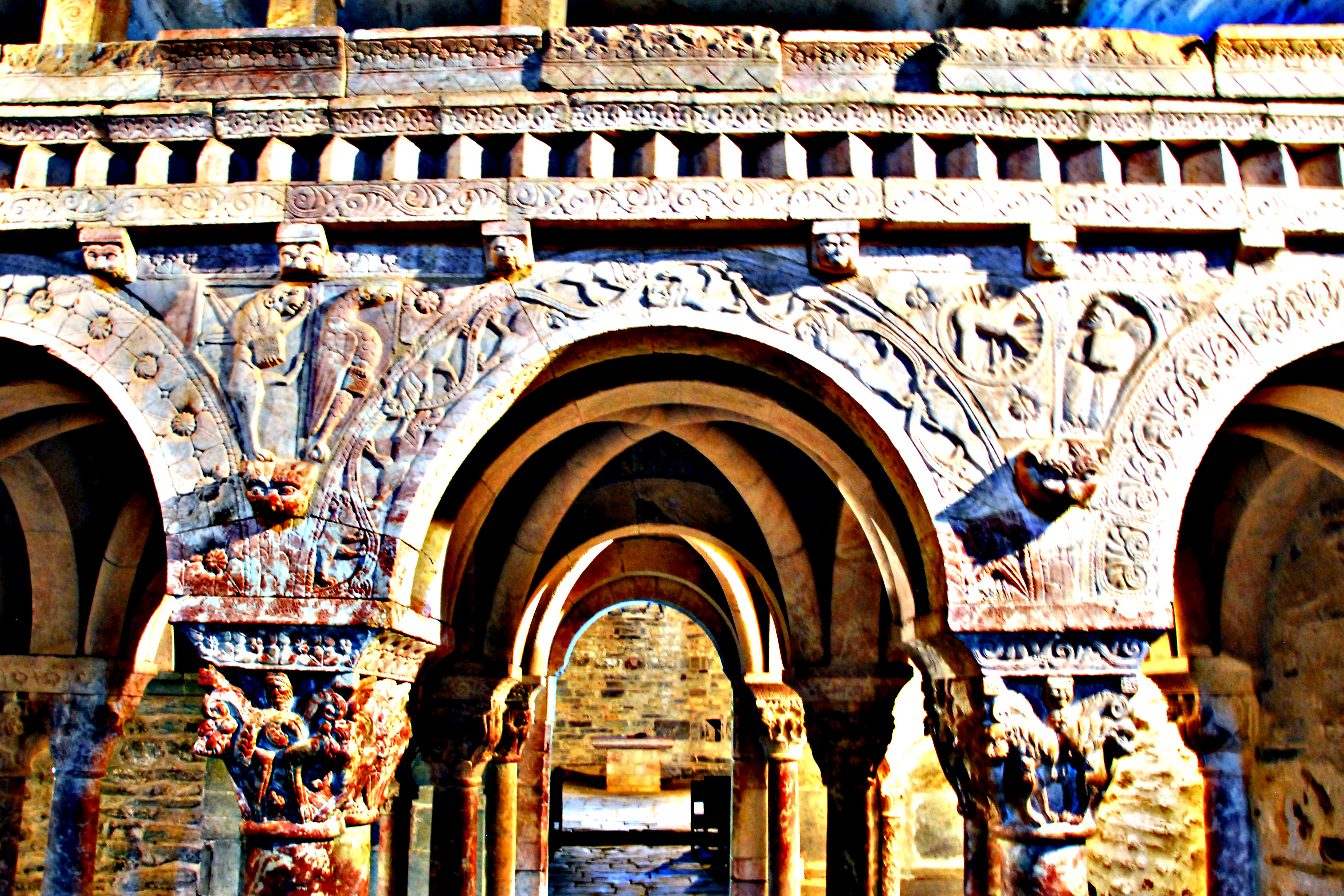 Serrabone, Empore, Westfassade, Mittelarkade